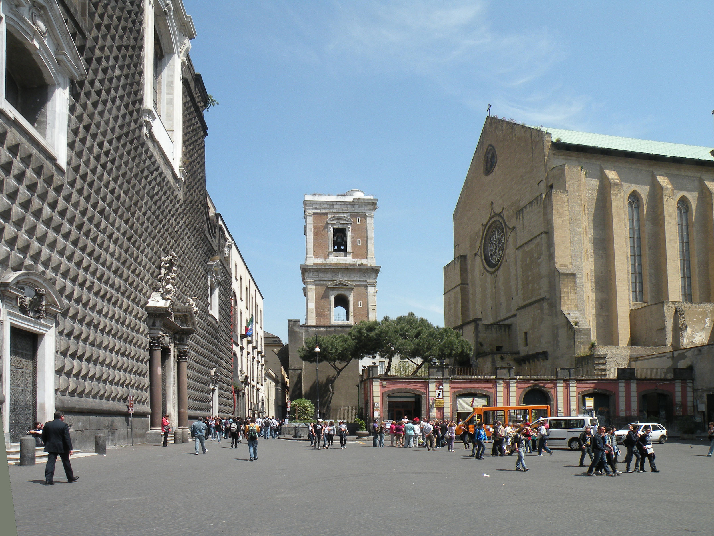 Базилика св.Клары